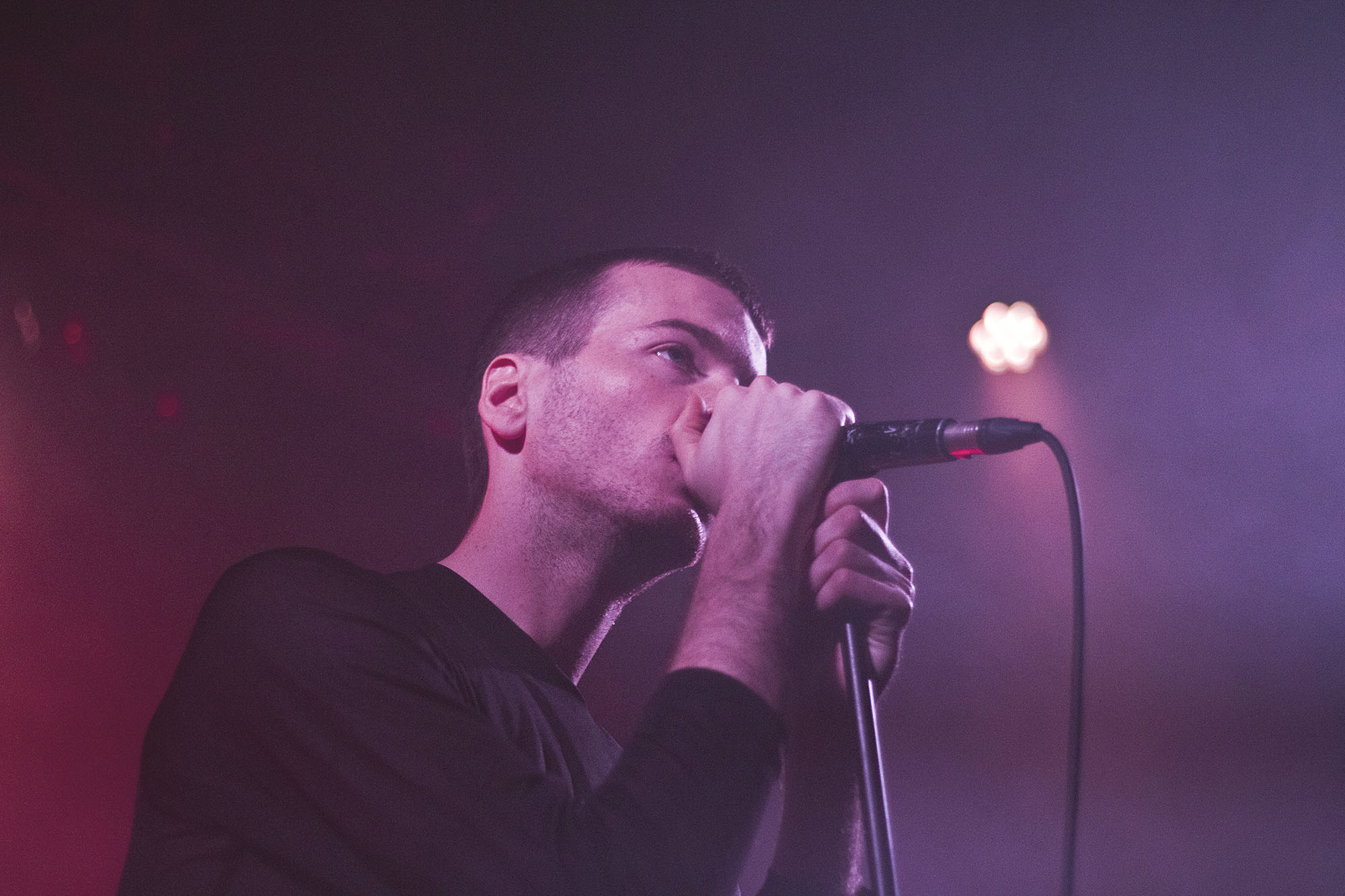 Robert Alfons (Trust), live a Bologna, 2015